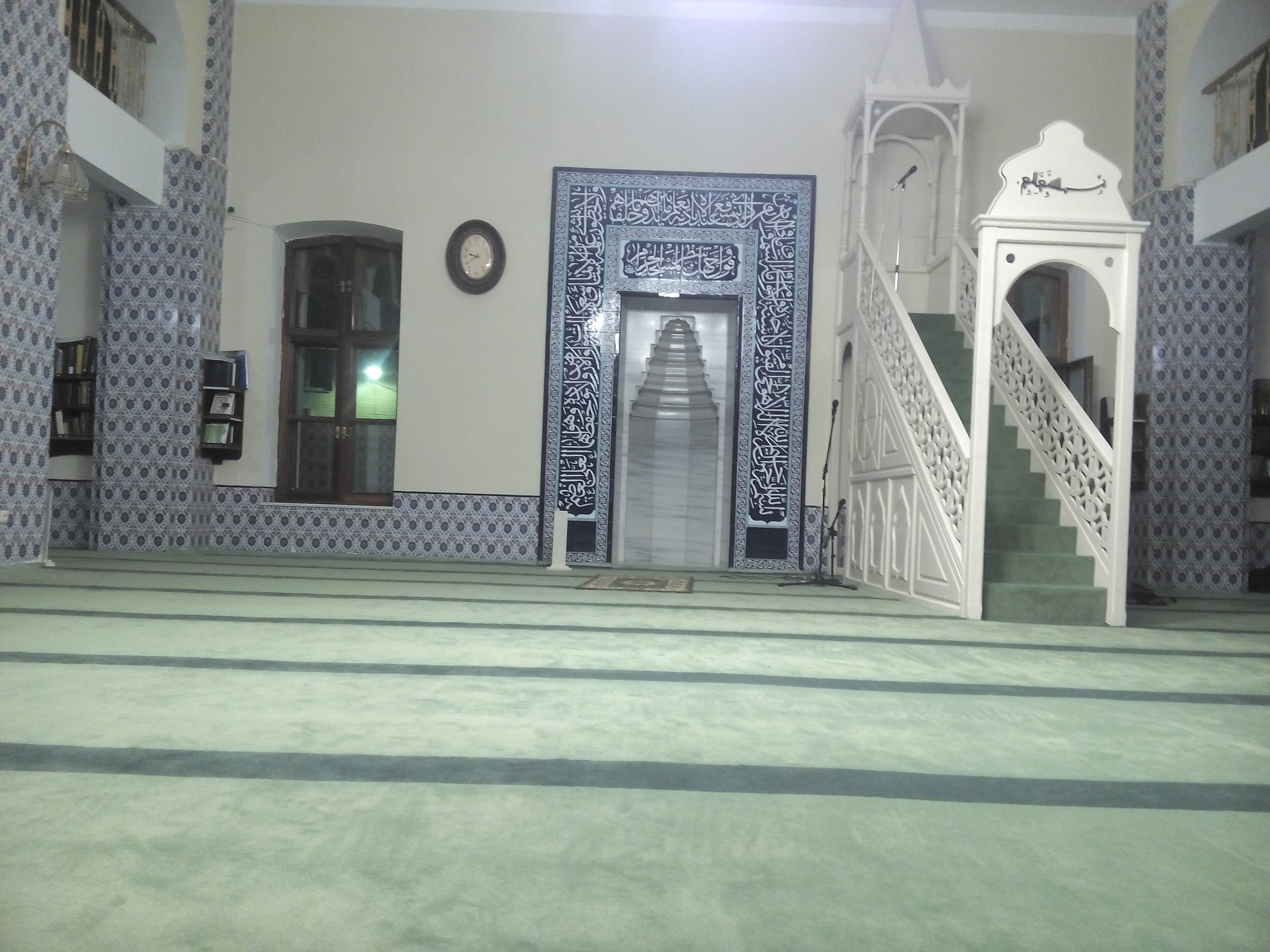 Минбар и михраб московской исторической мечети